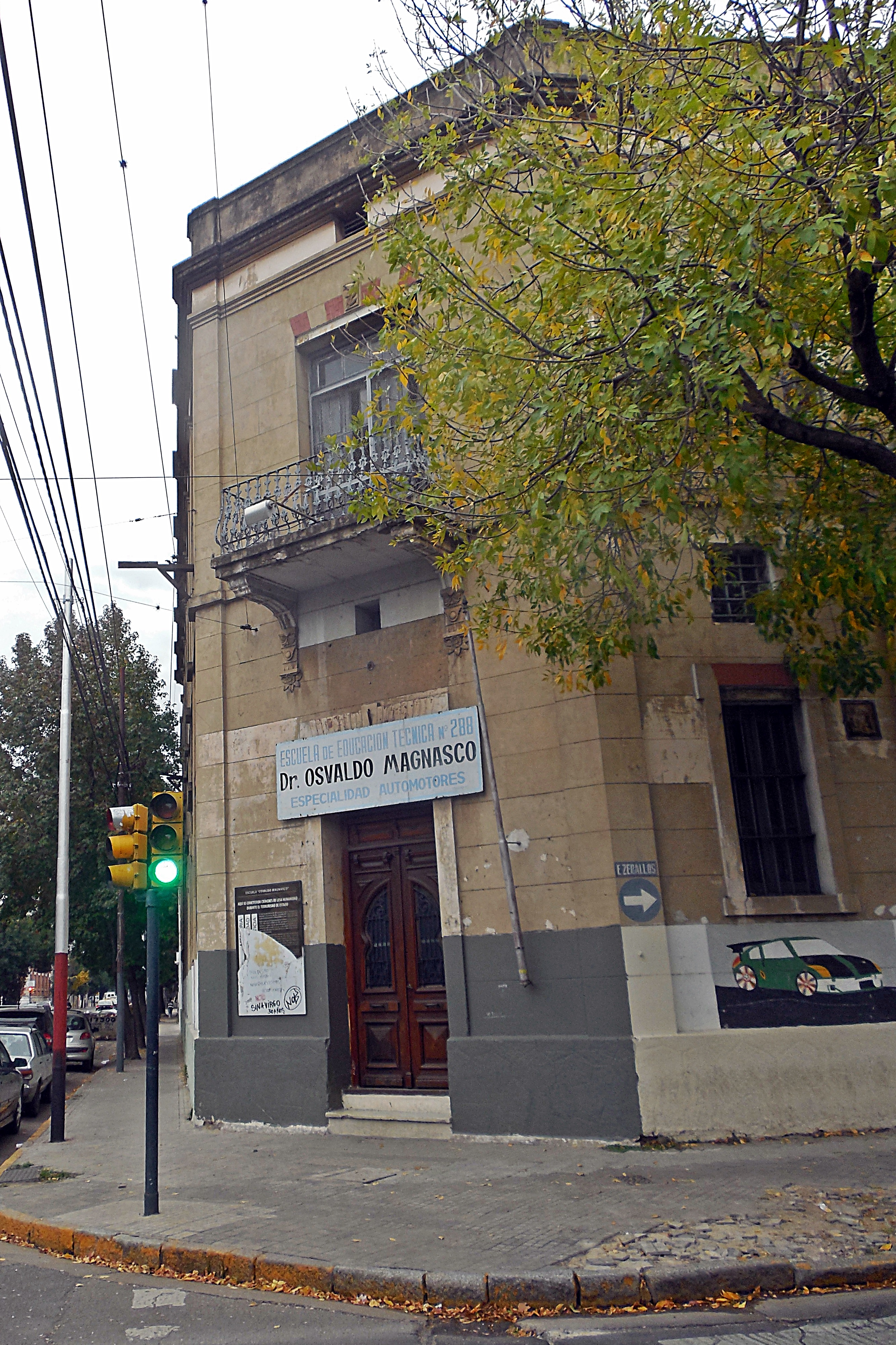 Escuela Osvaldo Magnasco